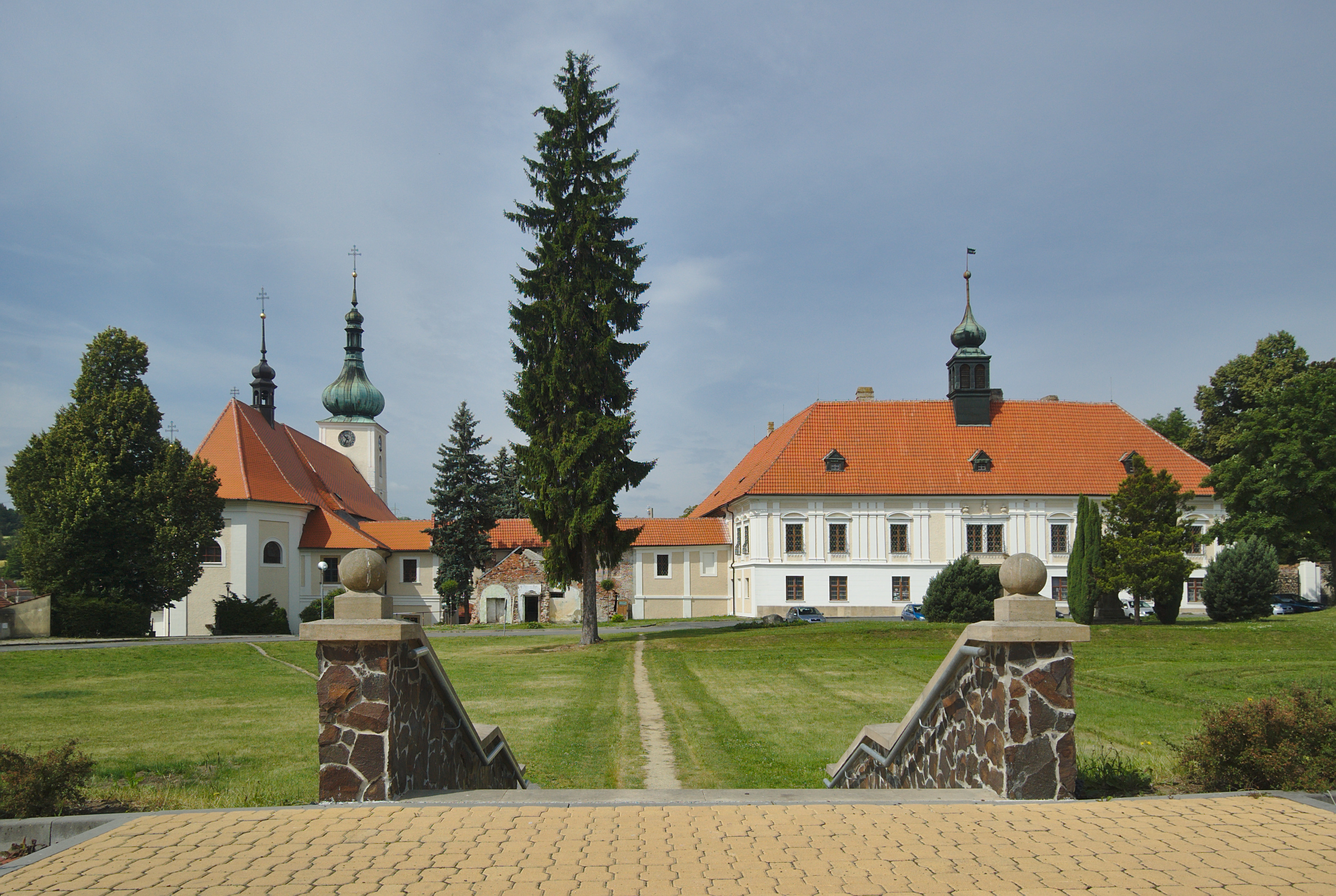 Kostel Narození Panny Marie a zámek, Konice, okres Prostějov